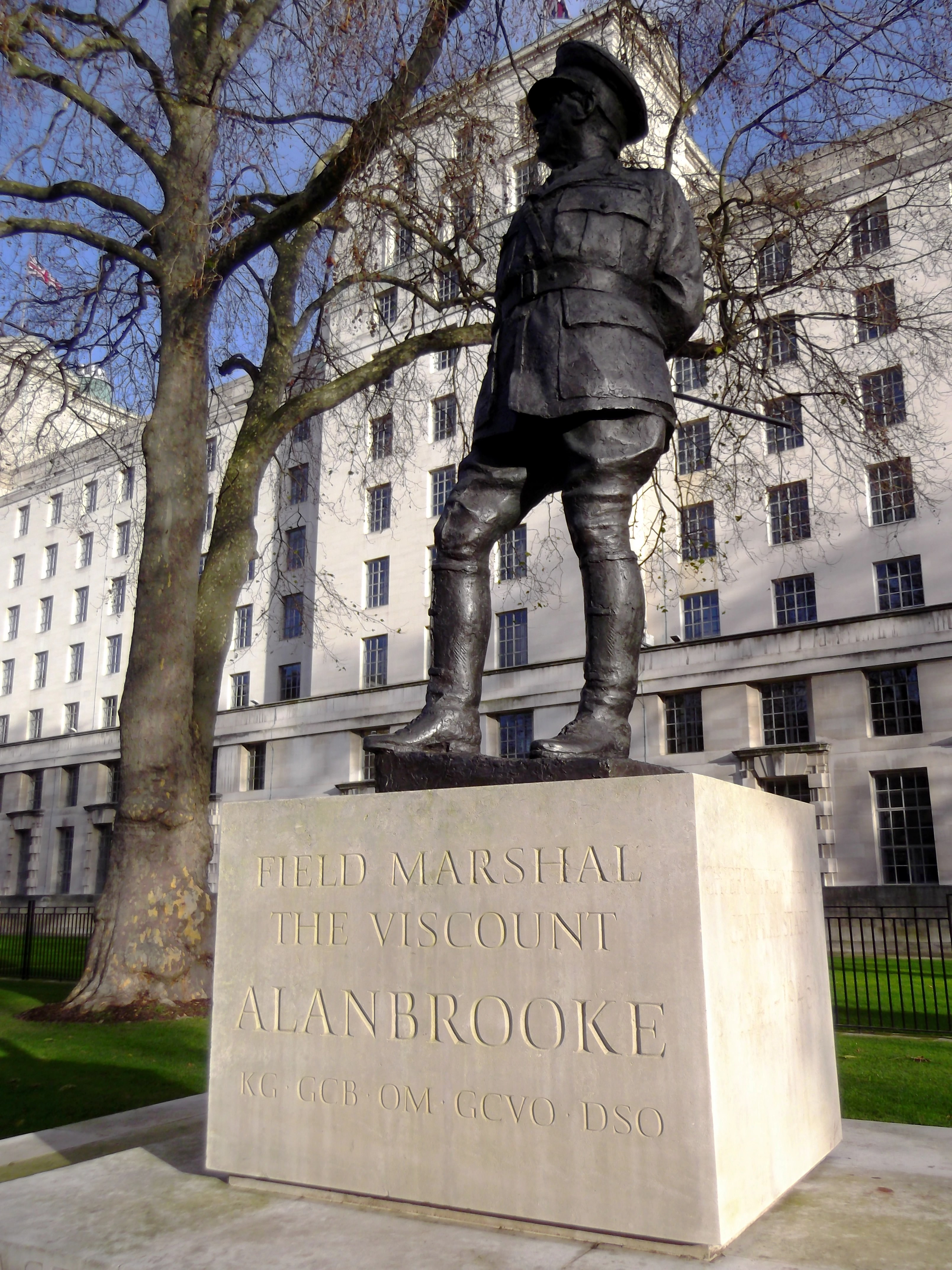 London 030 Alenbrooke